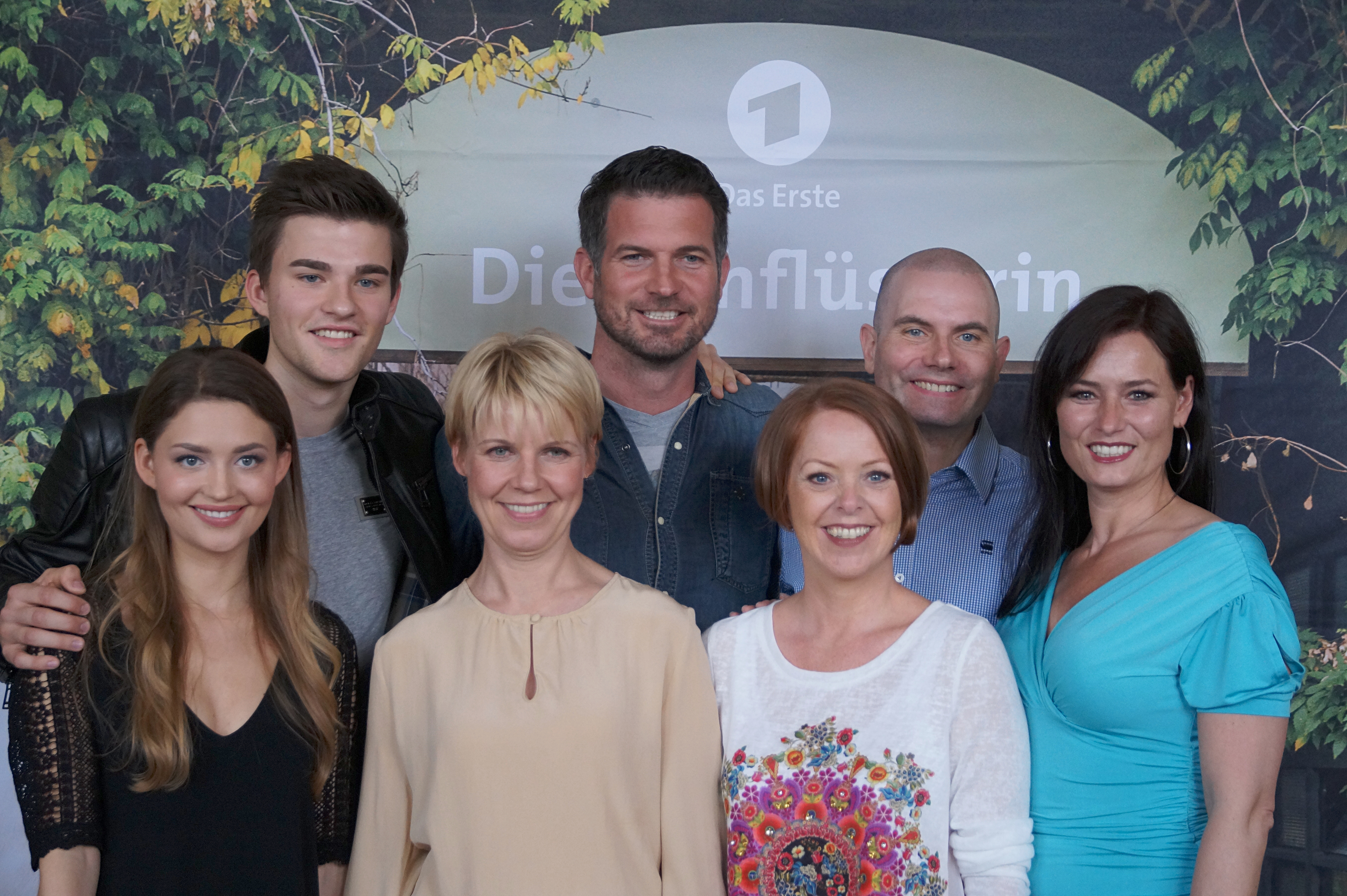 Pressetermin Comedy-Serie „Die Kuhflüsterin" am 25. Juni 2015 im Kölner Filmhaus